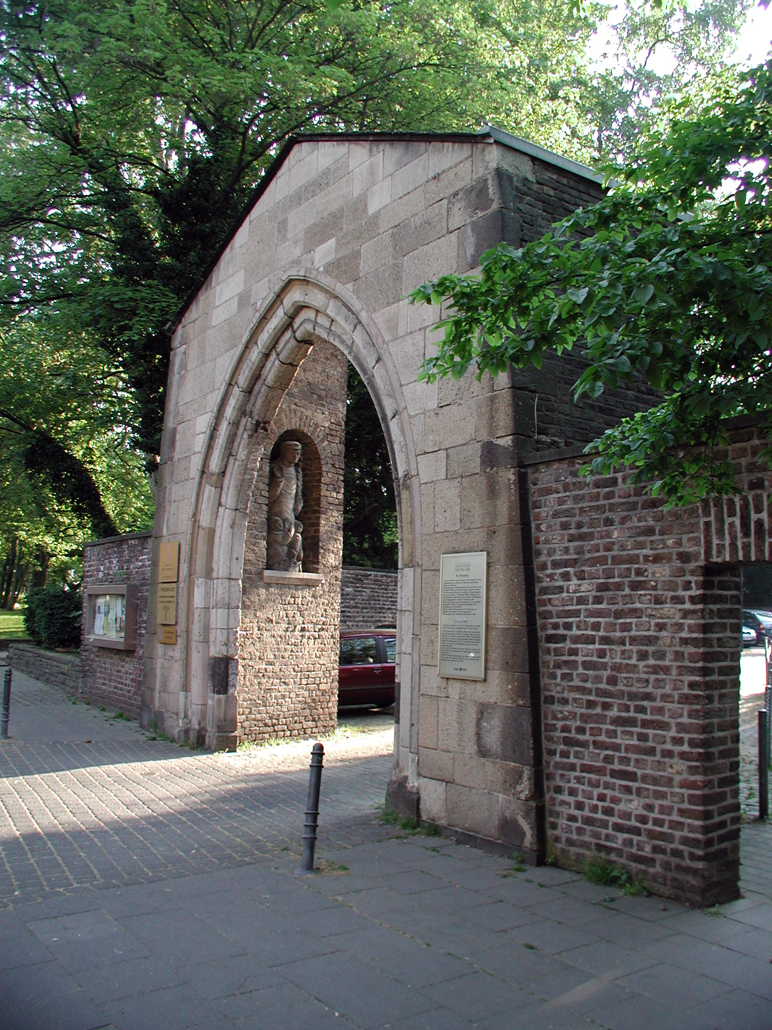 Kölner Bäche, Pantaleonspforte Weidenbach